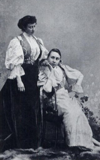 Cecile Goekoop-de Jong (links) met haar zuster Elisabeth